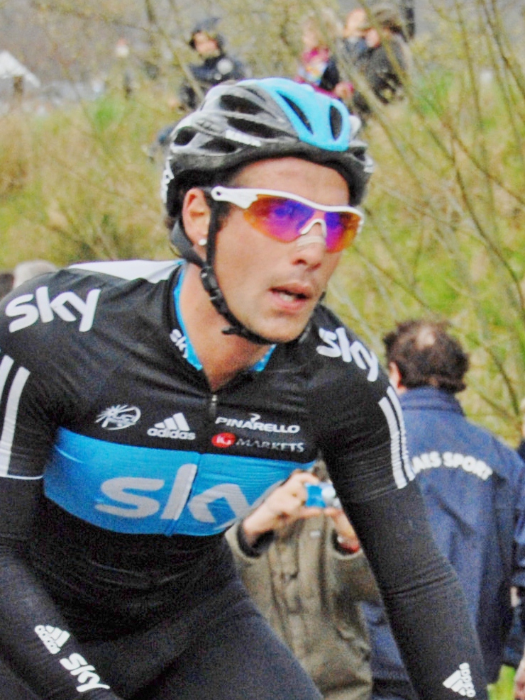 Côte de Stockeu in Luik-Bastenaken-Luik 2012